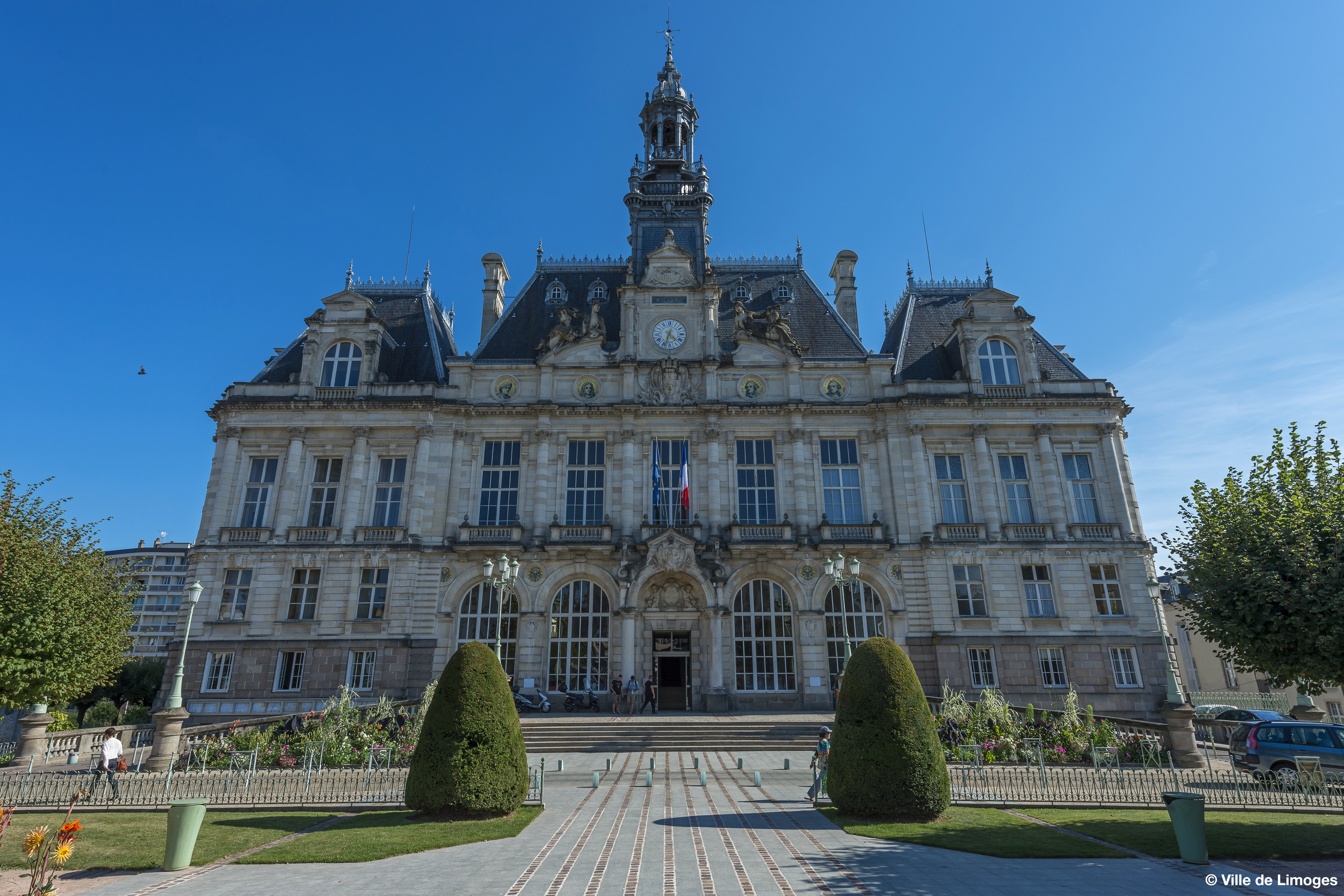 Hôtel de ville Limoges.